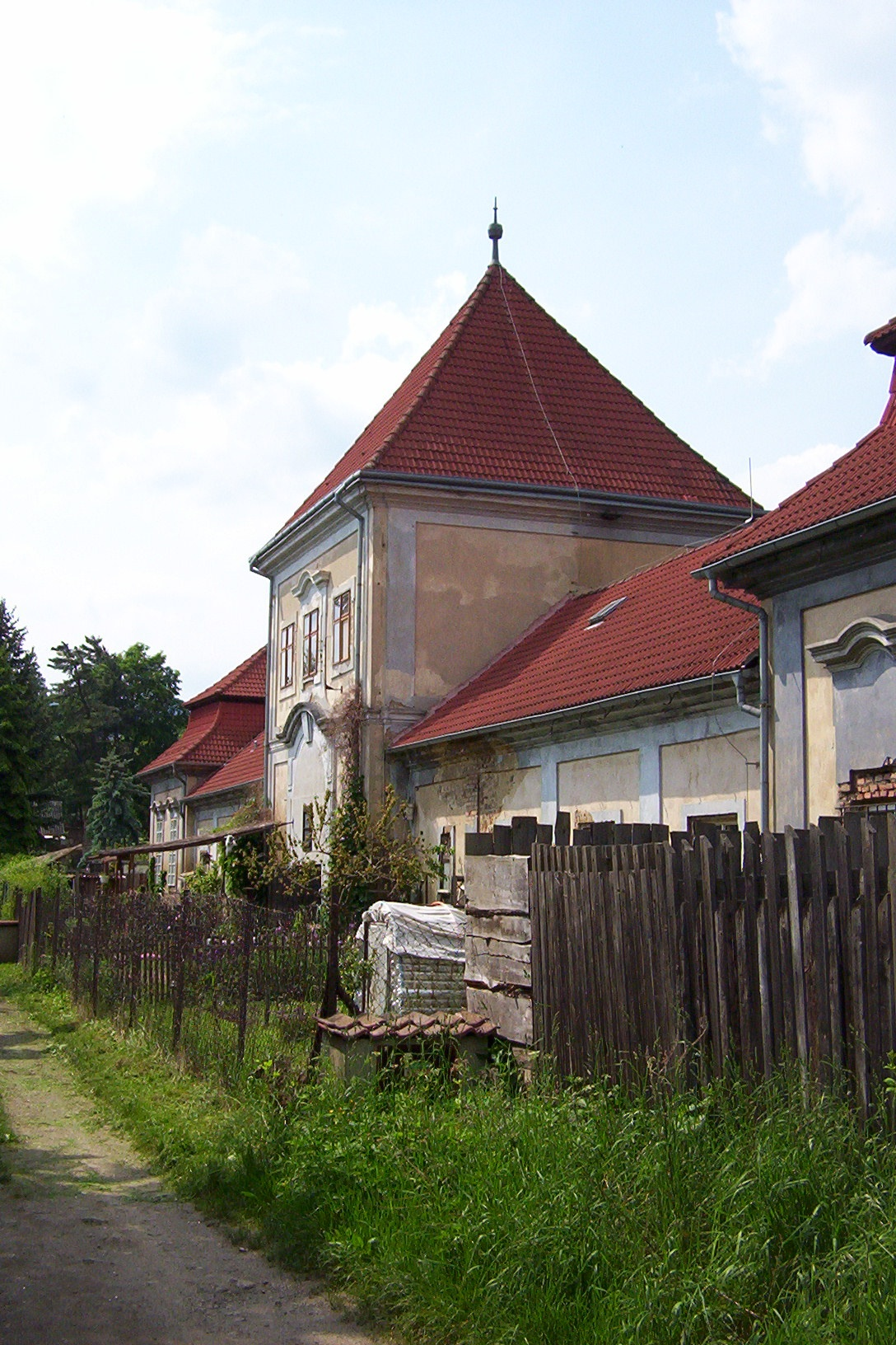 Zámek Litvínov-Janov, Loupnická 2, Litvínov-Janov, zadní trakt